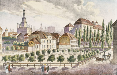 Poznań, Plac Sapieżyński.